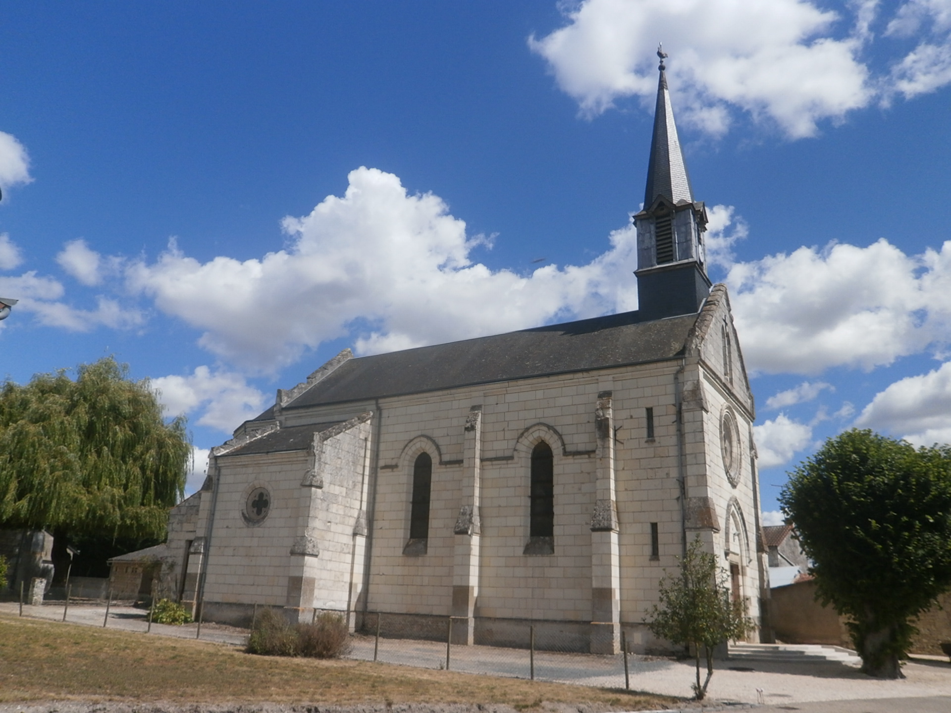 L'église de Razines